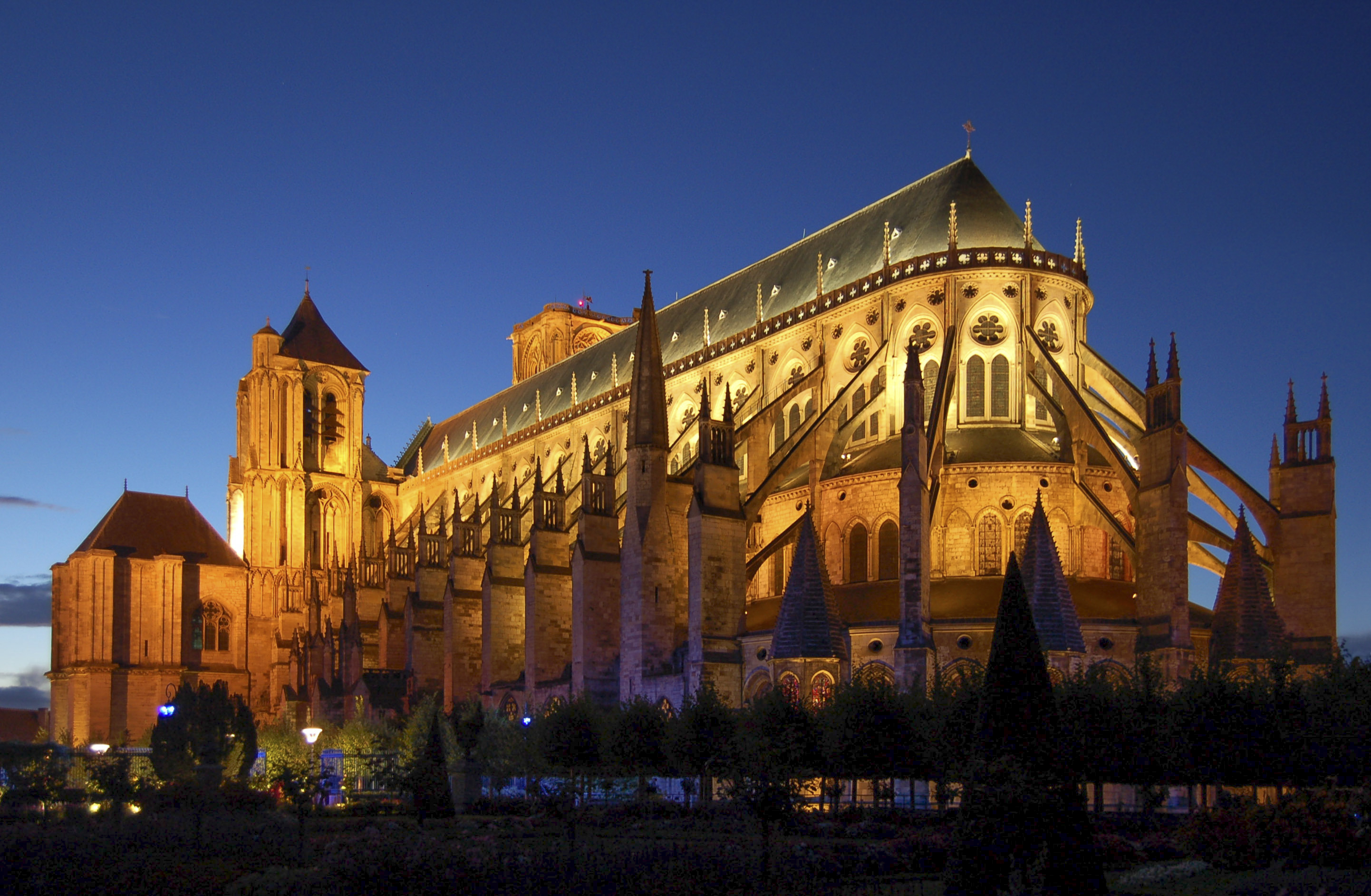 Kathedrale Saint-Etienne von Bourges bei Nacht